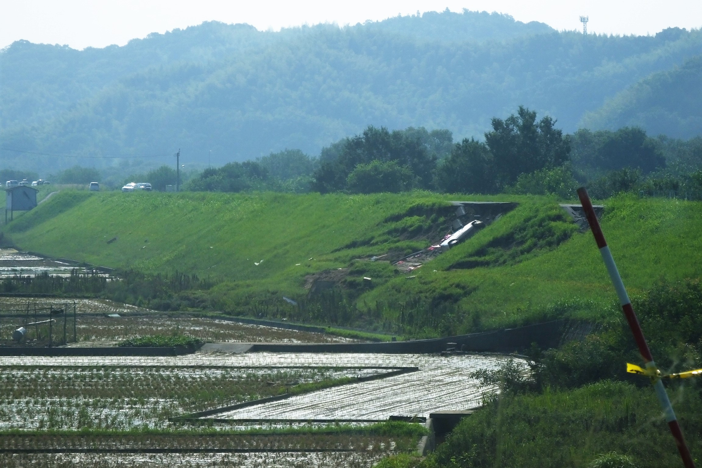 2018-07-14 Floods of Mabi, Kurashiki City 倉敷市真備 平成30年7月豪雨被害 小田川土手決壊